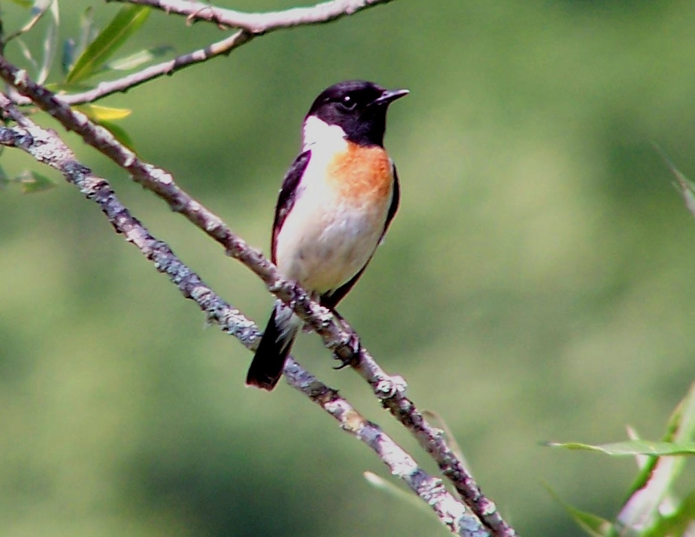 Stejneger's Stonechat - Saxicola stejnegeri. Eastern Hokkaido, Japan.